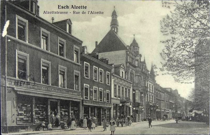 Rue de l'Alzette at Esch-sur-Alzette (Grand Duché du Luxembourg) beginning of XX century.